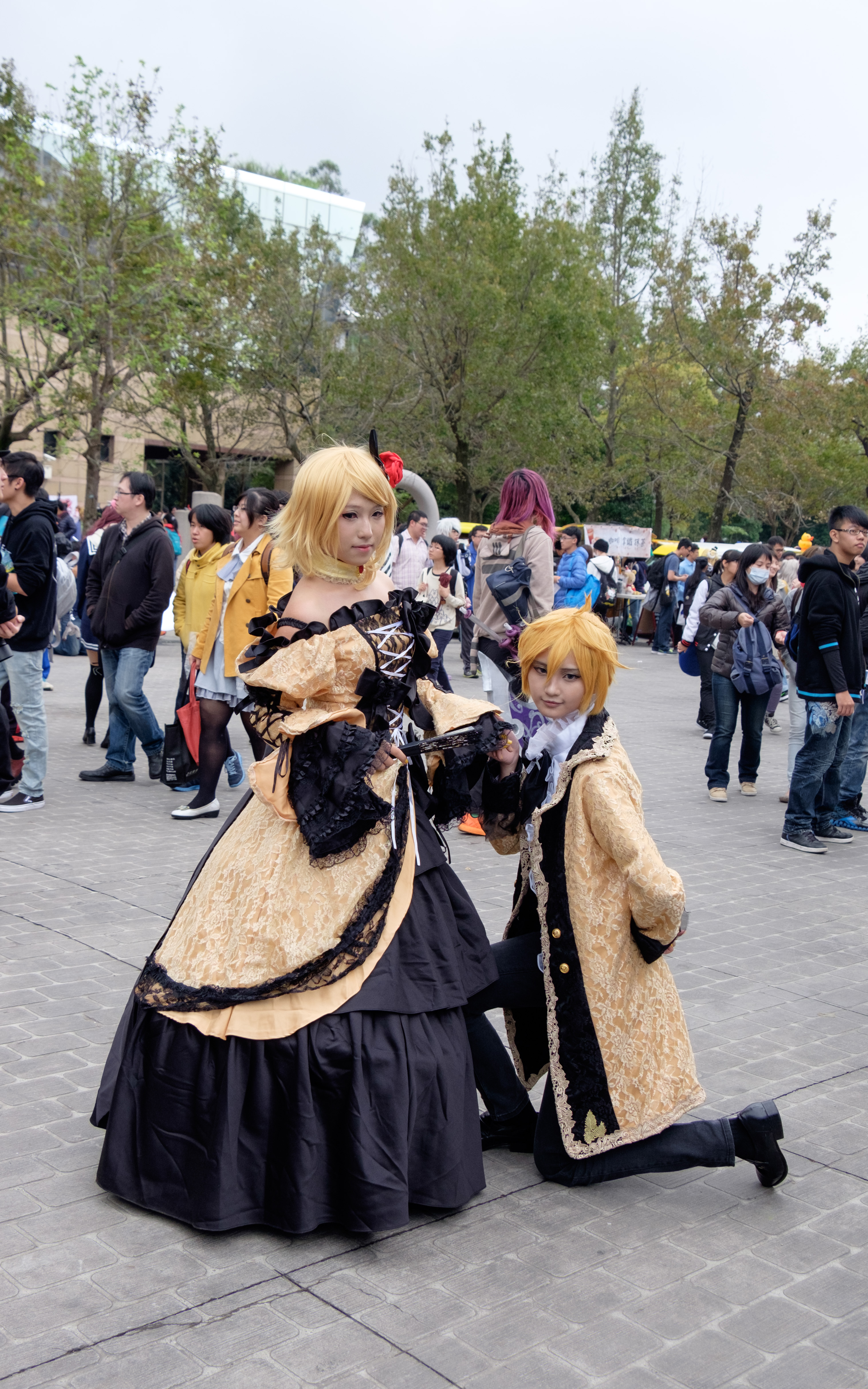 CWT41第一日下午，Vocaloid鏡音リン・レンCosplayers。